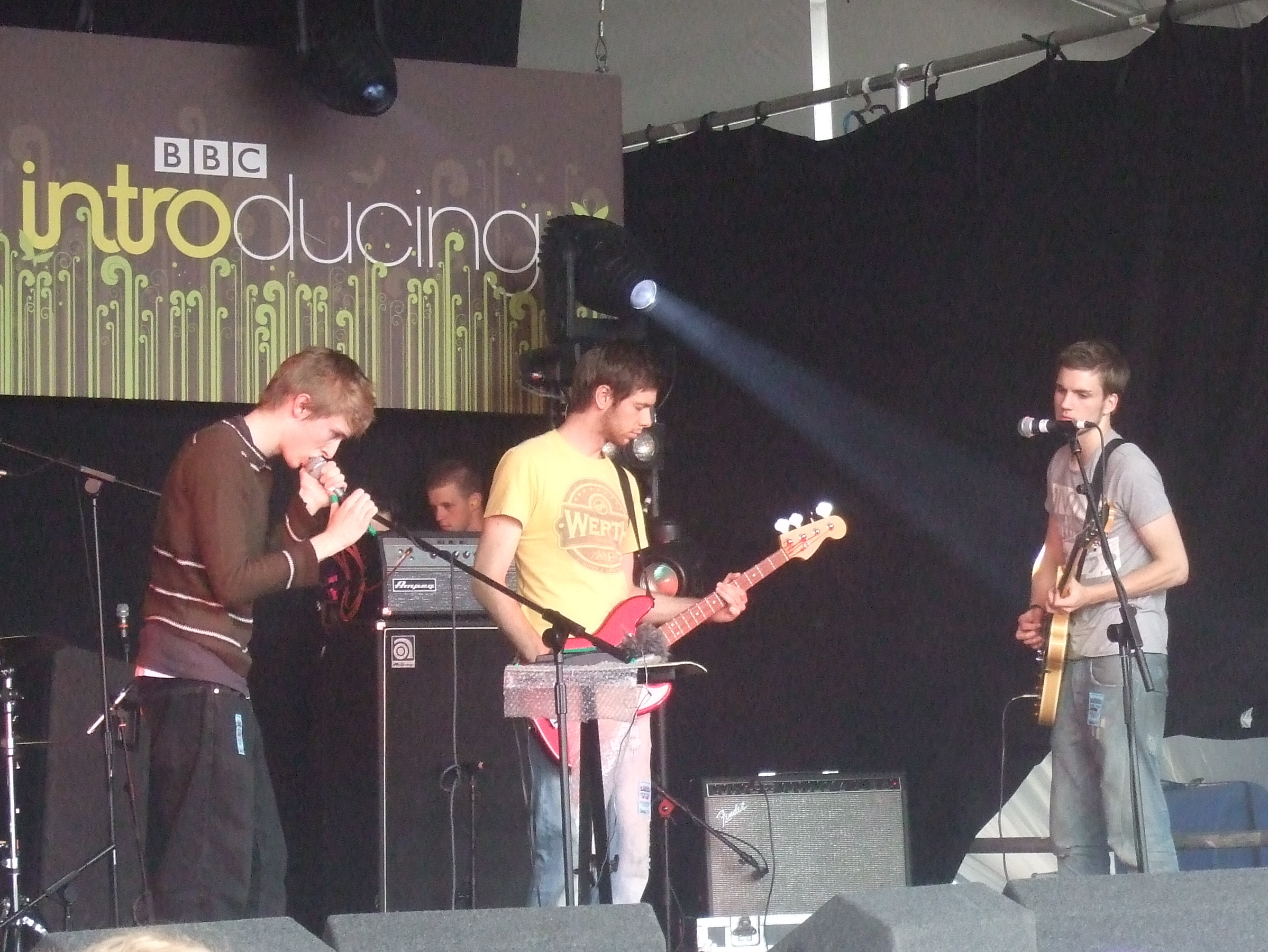 Kyte Latitude Festival 2008